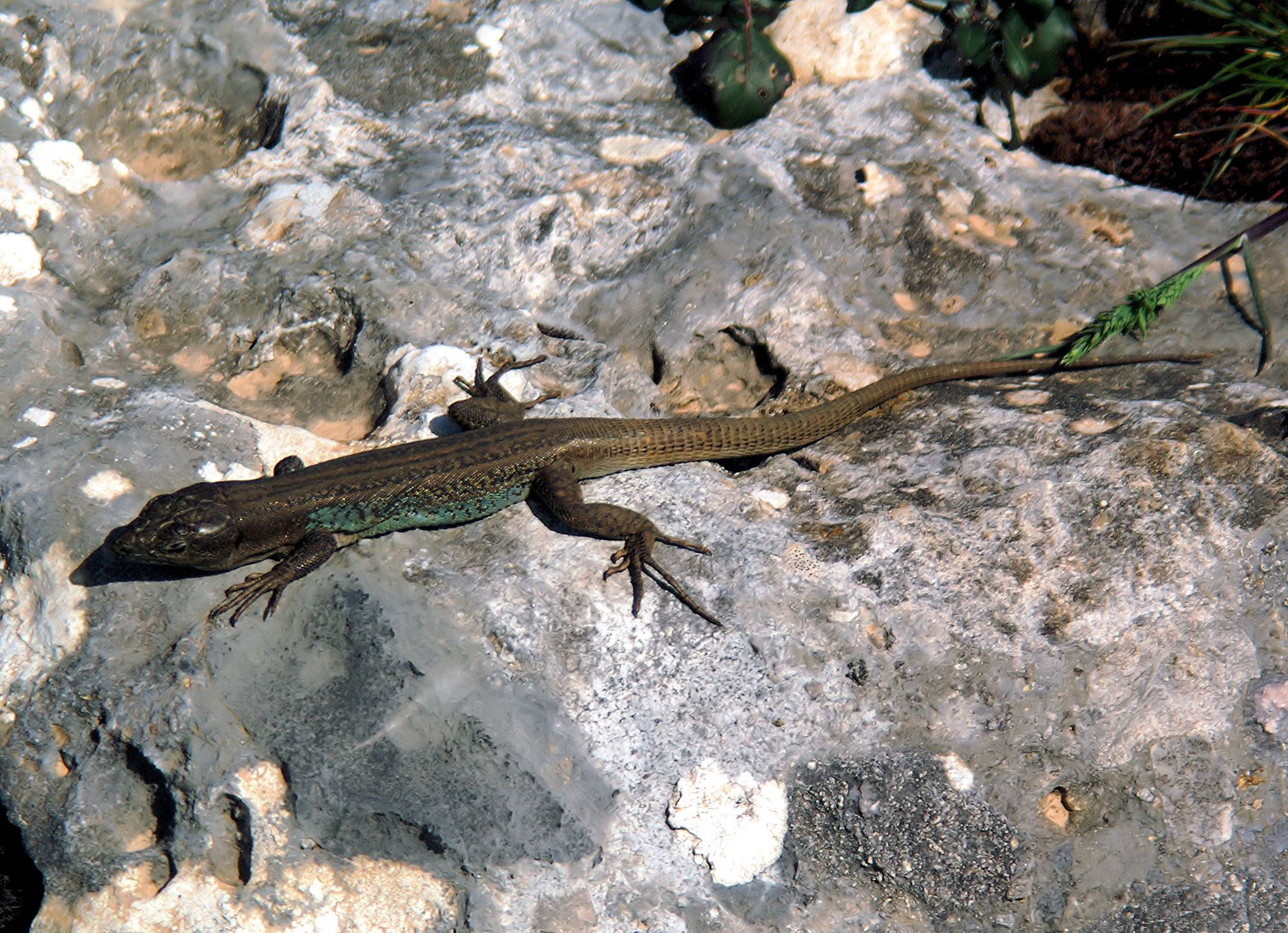 Podarcis peloponnesiacus male